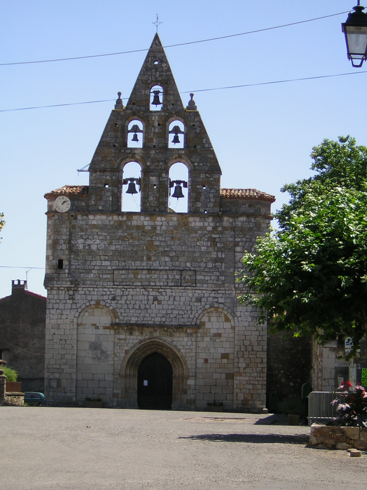 Alan: iglesia con espadaña en tres alturas, del siglo XIV.